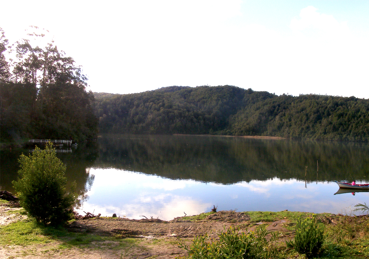 Vista del estuario Cutipay desde la salida del puente con el mismo nombre.